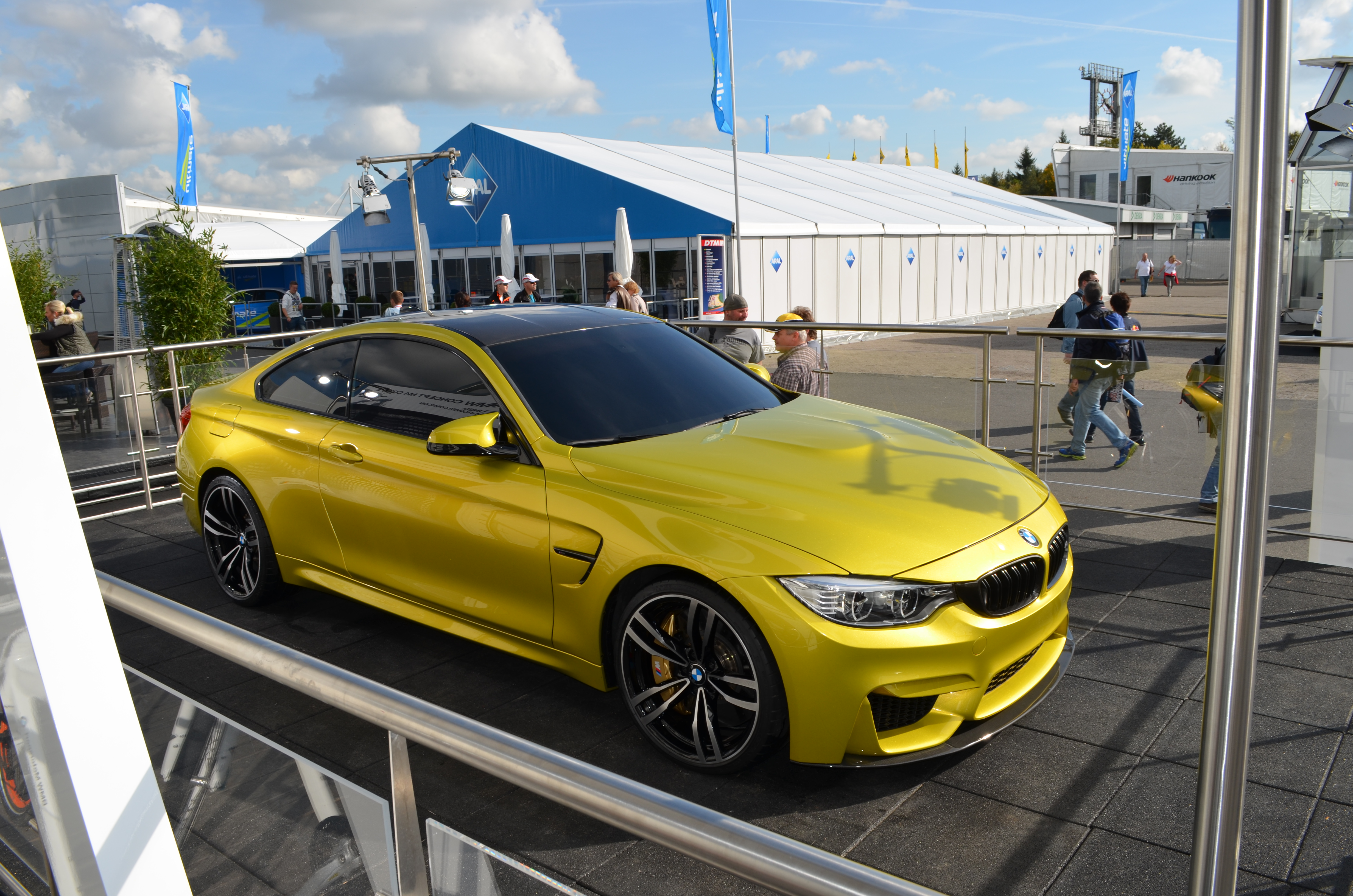 DTM 2013 Hockenheim